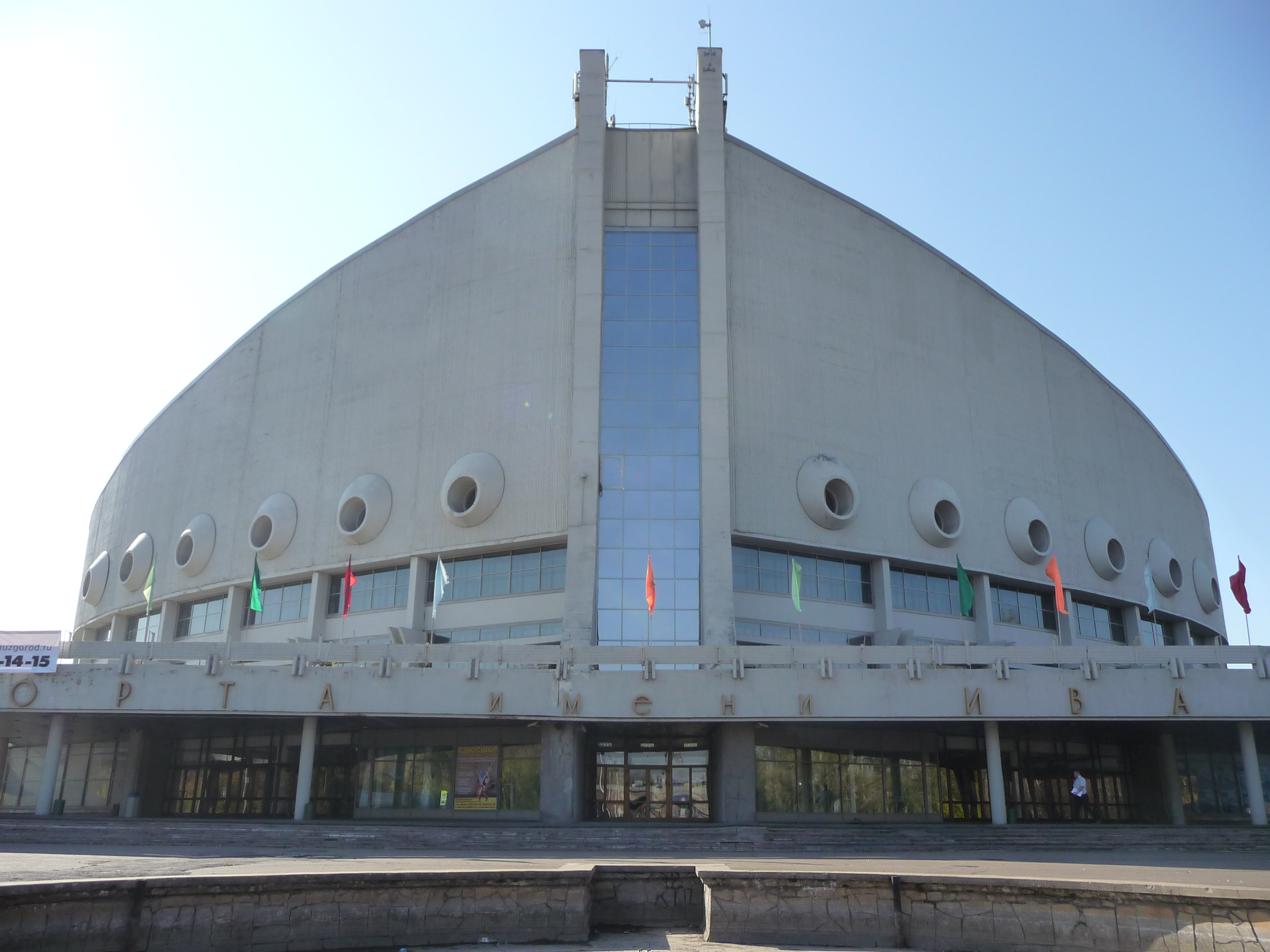 Krasnoyarsk Ivan Yarygin Sports Palace